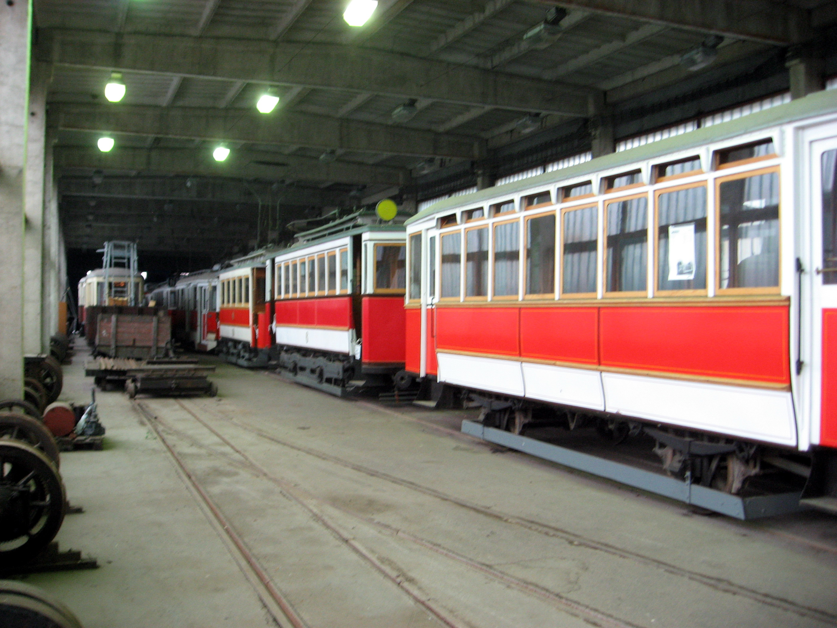 Brněnské tramvaje ev. č. 205, 6 a 10 (zprava doleva) - exponáty Technického muzea v Brně, depozitář MHD v Líšni